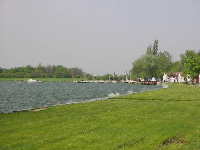 Palić